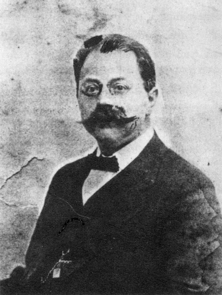 Hermann Weil (1868–1927), Aufnahme ca. 1910, reprod. in Kraichgau, Beiträge zur Landschafts- und Heimatforschung, Bd. 11, 1989